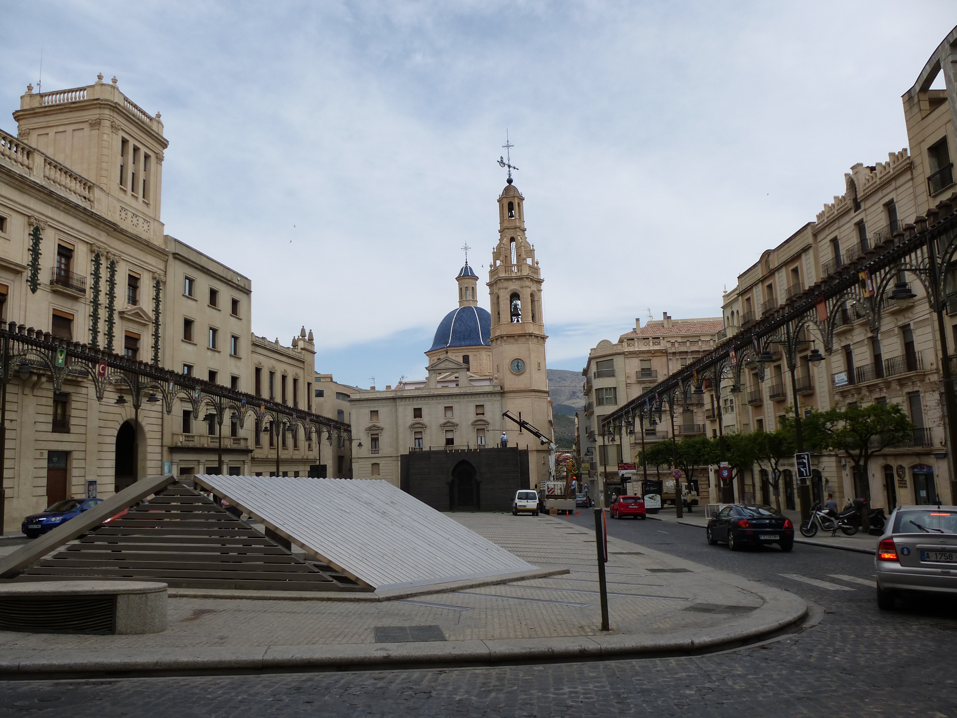 alcoi